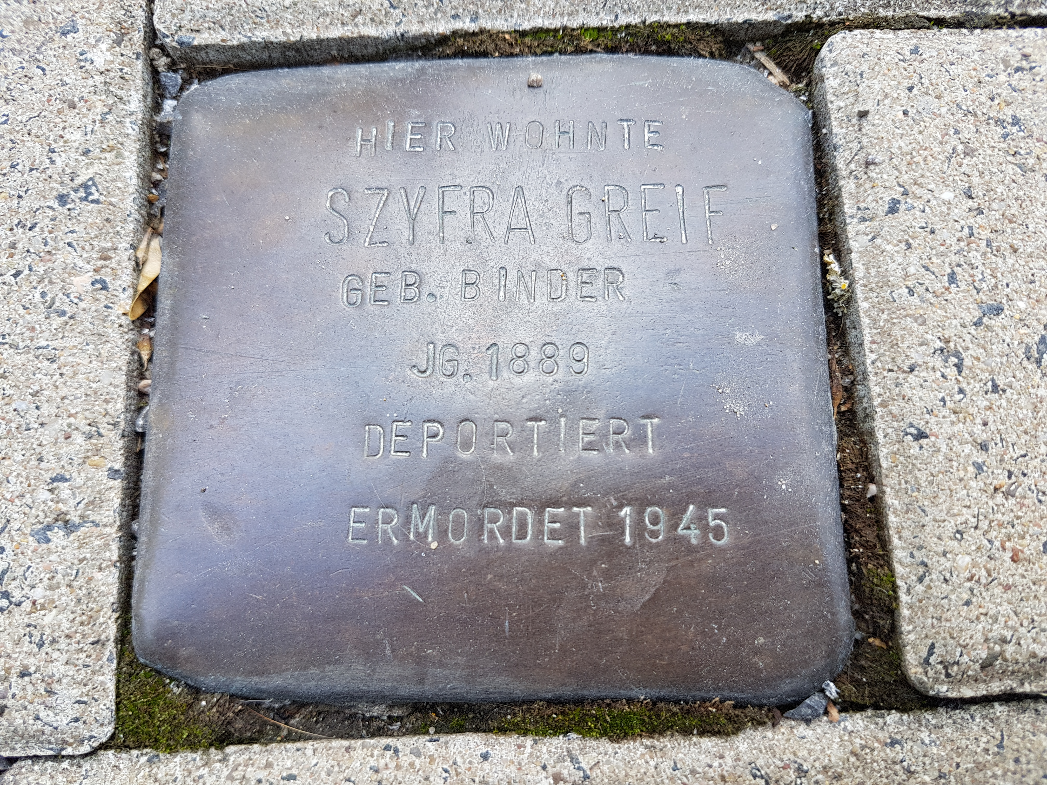 Stolperstein Duisburg Szyfra Greif